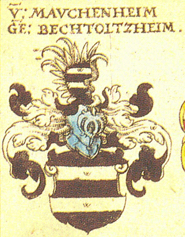 Wappen der Familie von Mauchenheim nach Siebmachers Wappenbuch